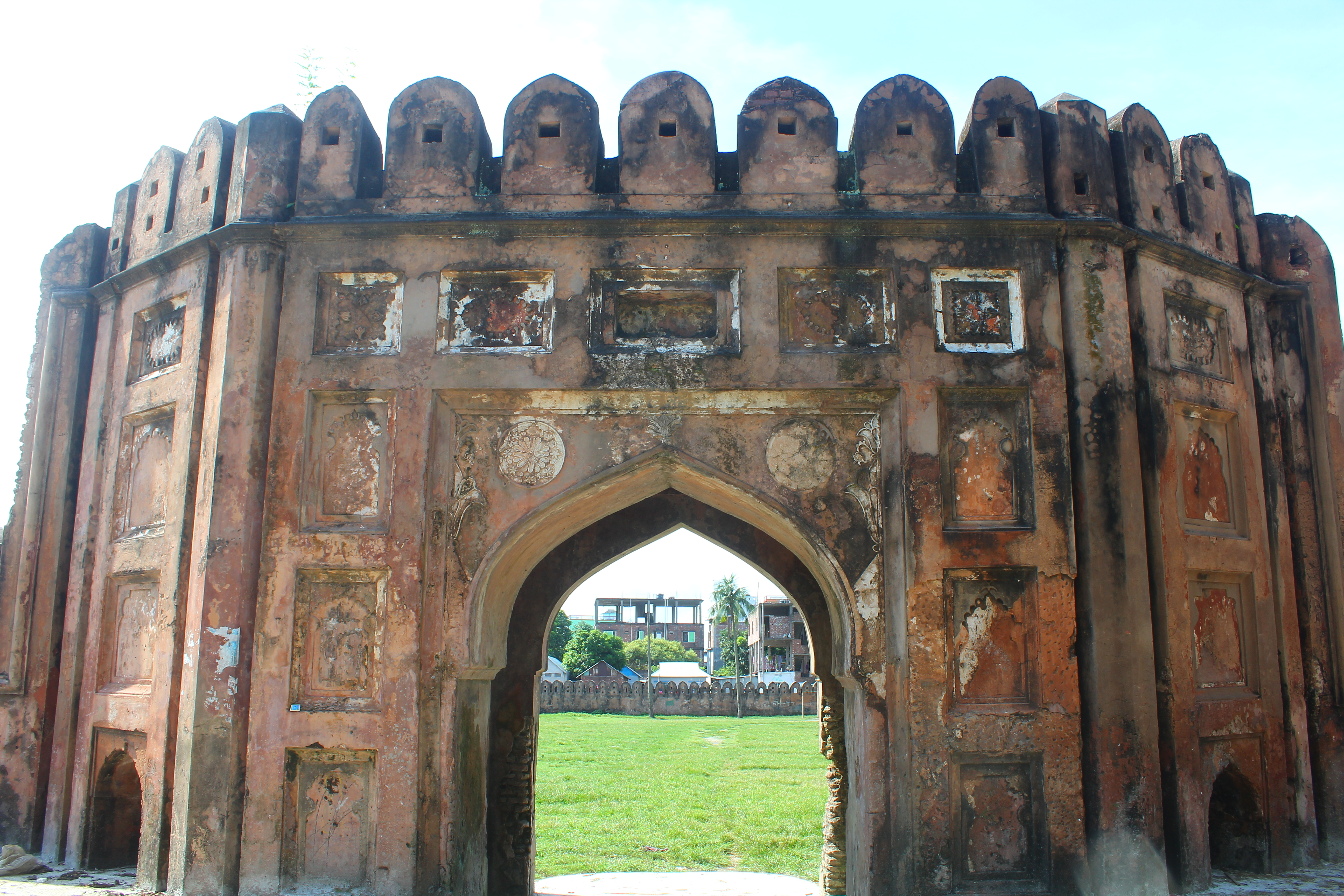 সোনাকান্দা দুর্গ